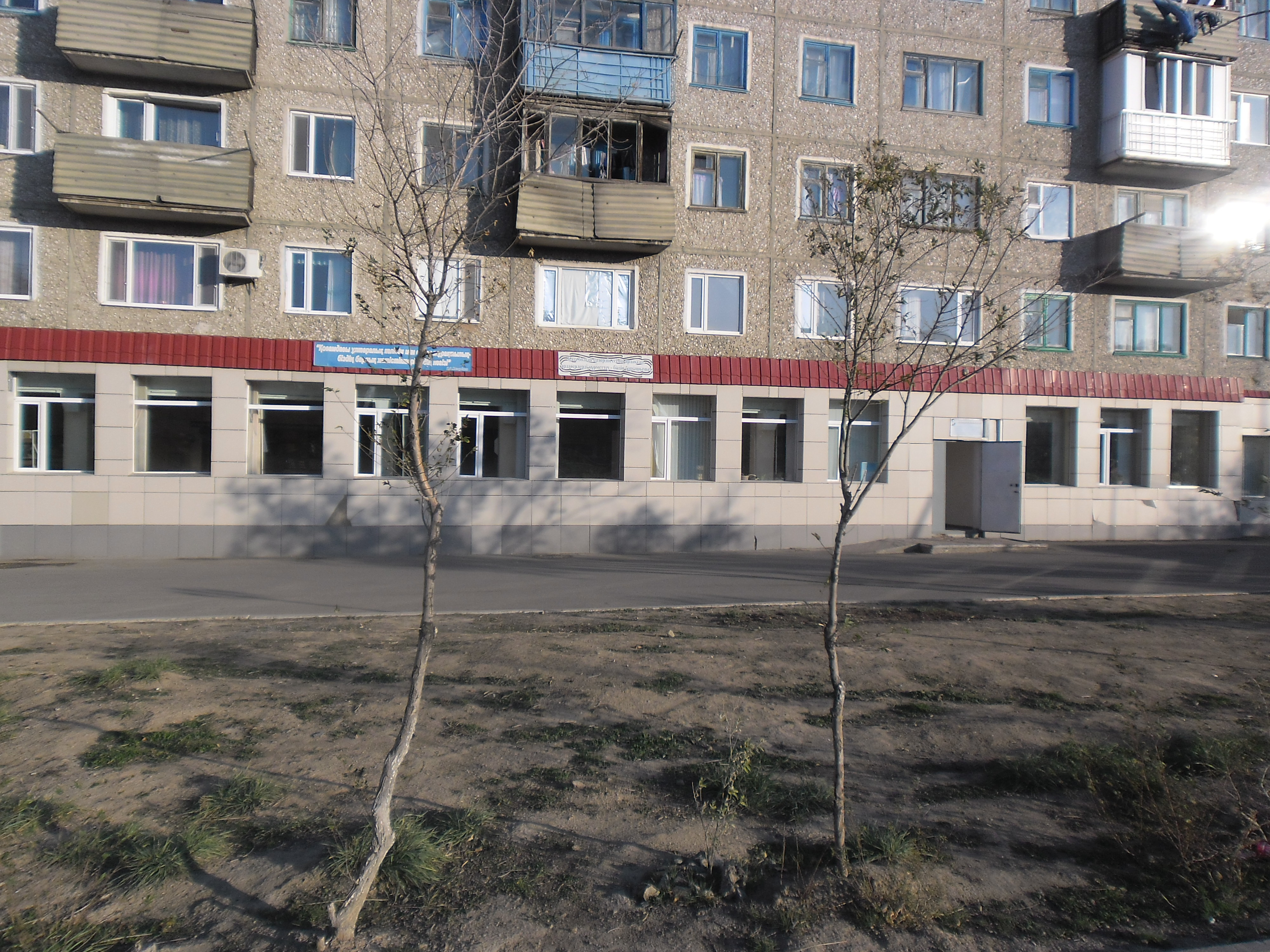 Сәтбаев қаласының орталықтандырылған кітапханасы